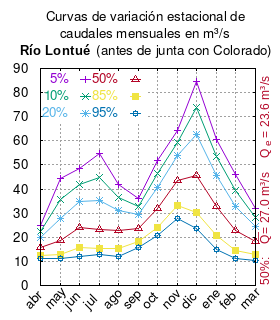 Curvas de variación estacional del río Lontué antes de su confluencia con el río Colorado. Ver problemas de nombre en fuente. # Dirección General de Aguas # Diagnóstico y clasificación de los cursos y cuerpos de agua según objetivos de calidad. Cuenca del río Mataquito # Santiago de Chile # Ministerio de Obras Públicas (Chile) # 2004 # url: # urlarchivo: # Tabla 4.4: Río Palos en junta con Colorado (m3/s) pág. 42 (ver problema de nombres en la fuente) mes 5% 10% 20% 50% 85% 95% abr 24.693 22.272 19.749 15.938 12.552 11.016 may 44.426 35.584 27.740 18.522 13.008 11.331 jun 48.691 41.741 34.639 24.251 15.633 12.079 jul 54.846 44.679 35.250 23.388 15.526 12.894 ago 41.876 36.548 30.994 22.618 15.343 12.216 sep 36.165 32.958 29.453 23.757 18.232 15.606 oct 51.817 46.305 40.558 31.879 24.169 20.670 nov 64.467 59.502 53.727 43.697 33.183 27.898 dic 84.588 73.770 62.493 45.460 30.329 23.463 ene 60.705 53.634 45.760 32.830 20.585 15.116 feb 45.883 39.303 32.583 22.770 14.644 11.300 mar 32.140 28.384 24.418 18.314 12.850 10.435 This plot was created with Gnuplot.